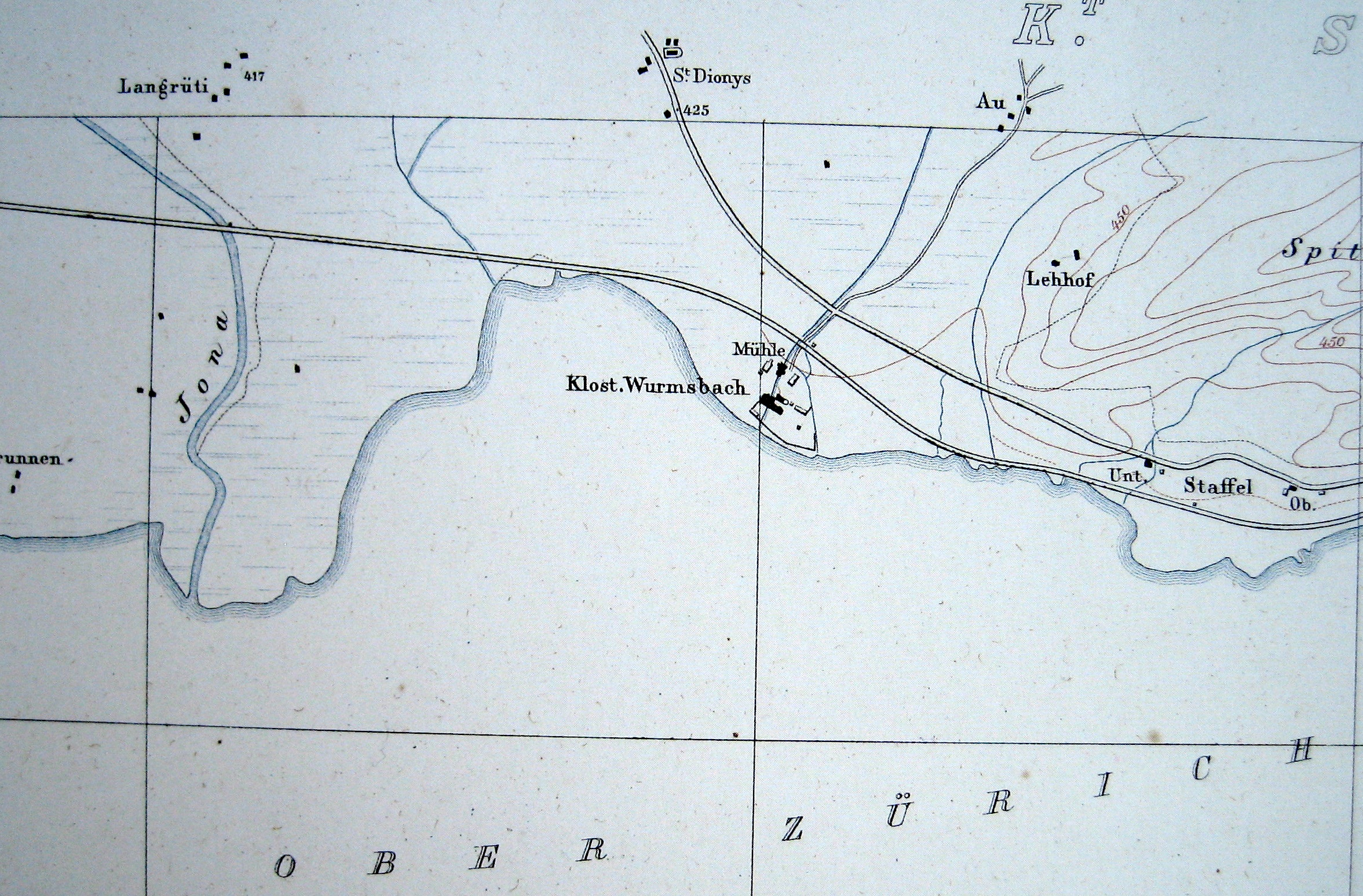 Kloster Wurmsbach auf der Wildkarte von 1848)